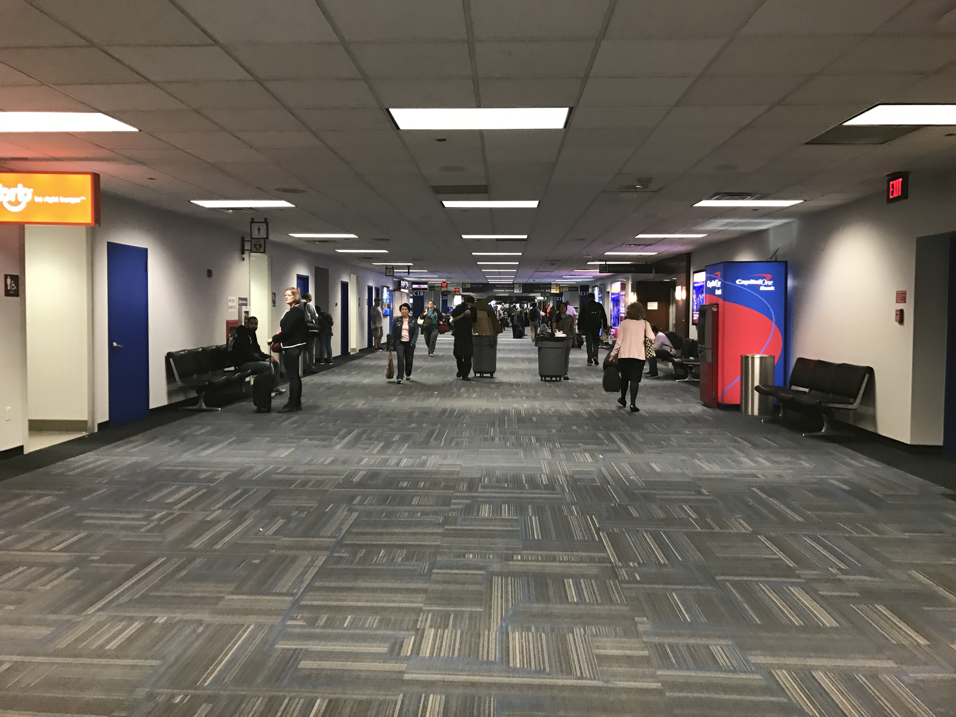 Sala C del Aeropuerto Internacional de Washington Dulles.